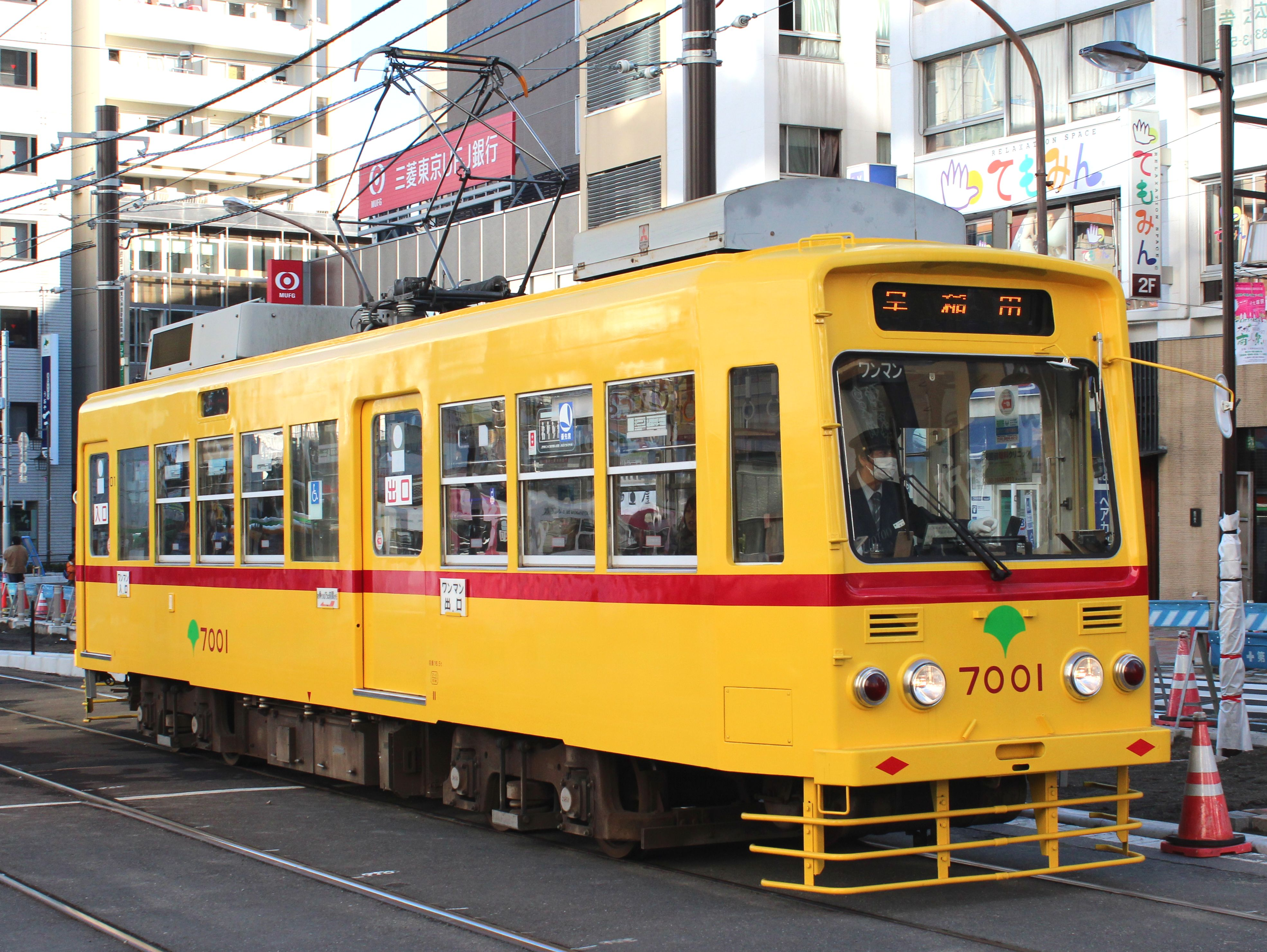 東京都交通局 7000形7001 大塚駅で撮影